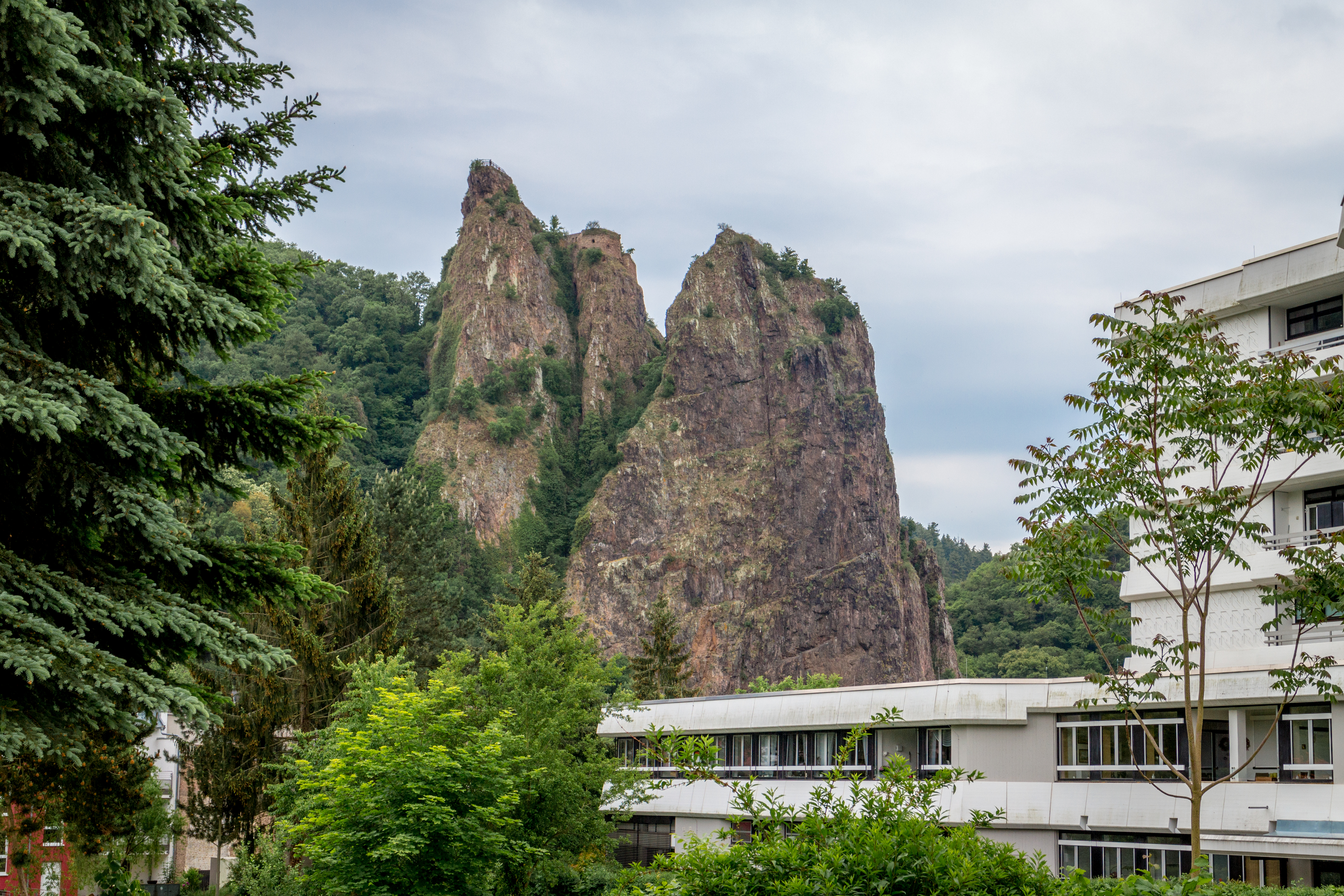 Blick auf den Rheingrafenstein mit Burgruine Rheingrafenstein, Felsen im Naturschutzgebiet „Gans und Rheingrafenstein“ (NSG 7133-056); im Vordergrund die ehemalige Kurklinik in Bad Münster am Stein